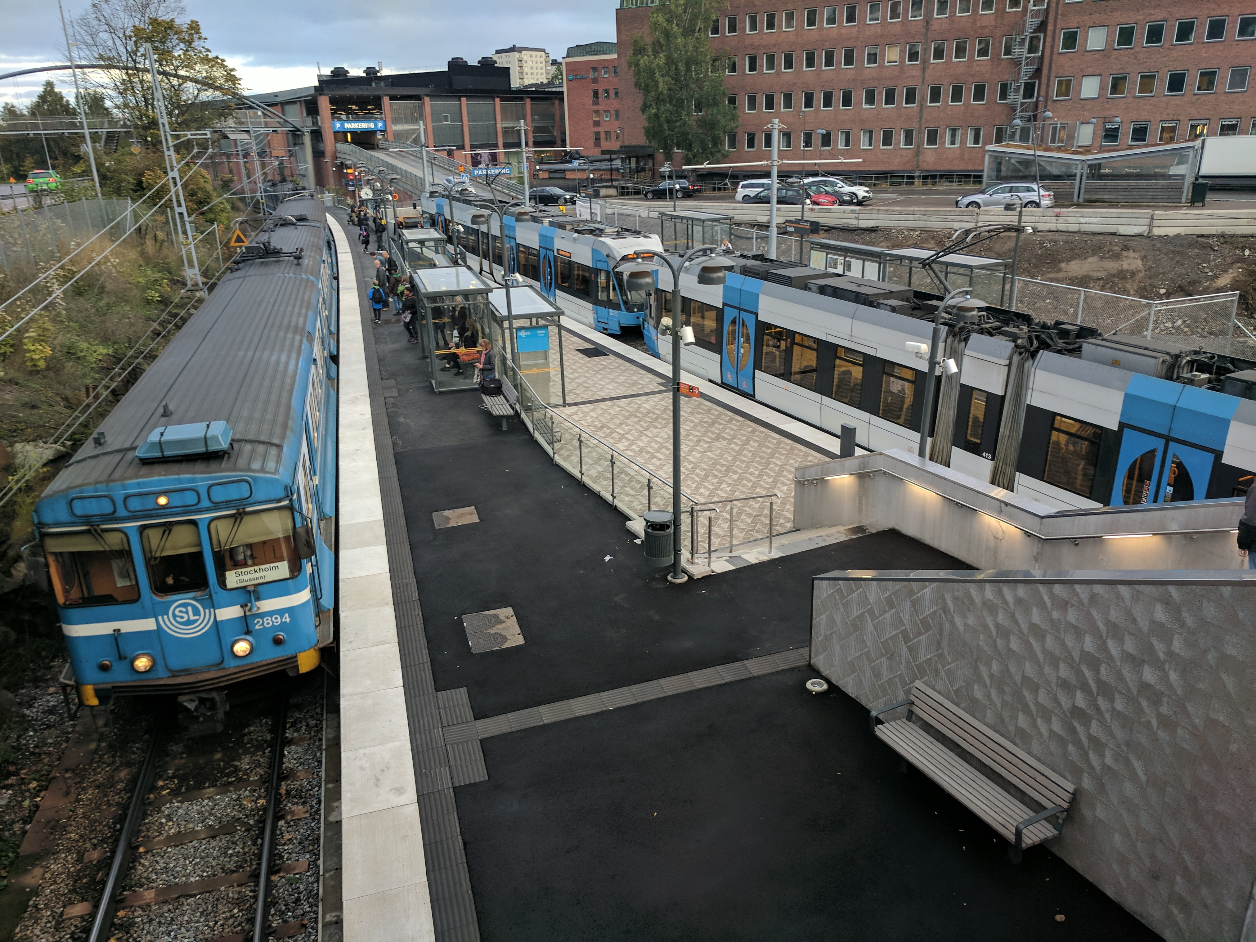 Sickla station för Tvärbanan och Saltsjöbanan